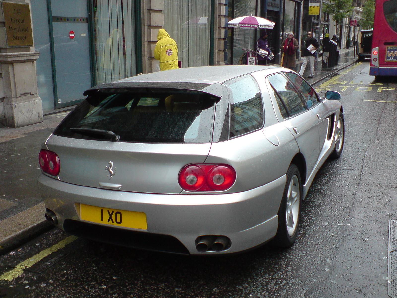 Ferrari 456E (Estate)